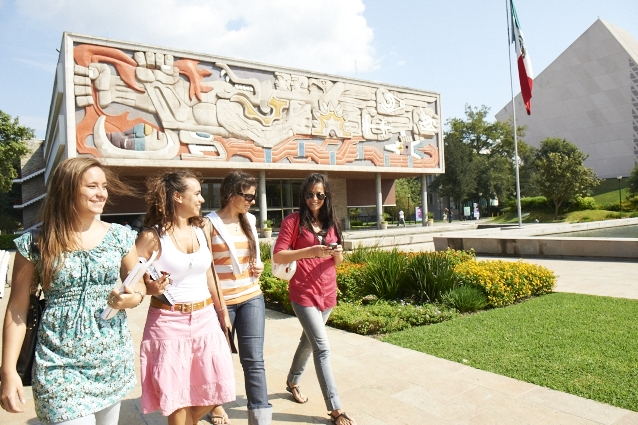 Rectoria del Campus Monterrey